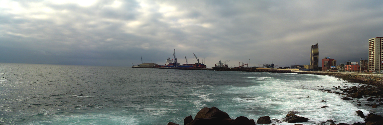 Costanera y puerto de Antofagasta (Antofagasta Terminal Internacional). Puerto de Antofagasta Source: [1] Date: 27/09/2005 Author: Marcos Escalier Other versions: SQUARE